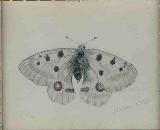 Tegning av Sommerfugl.